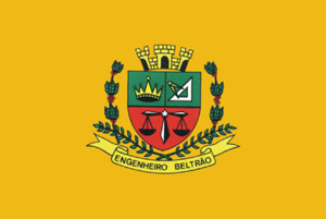 Bandeira de Engenheiro Beltrão.